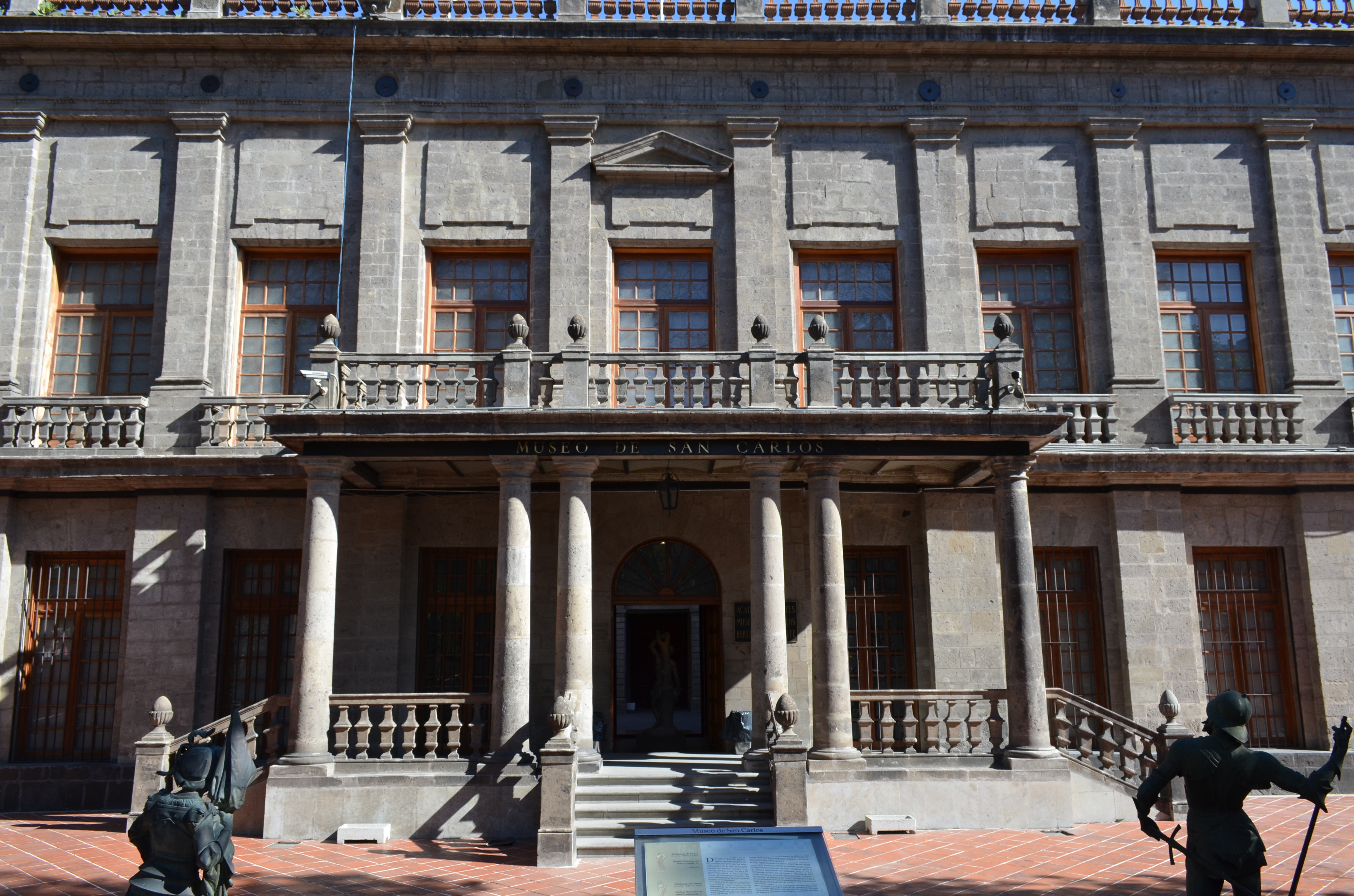 Museo de San Carlos parte trasera